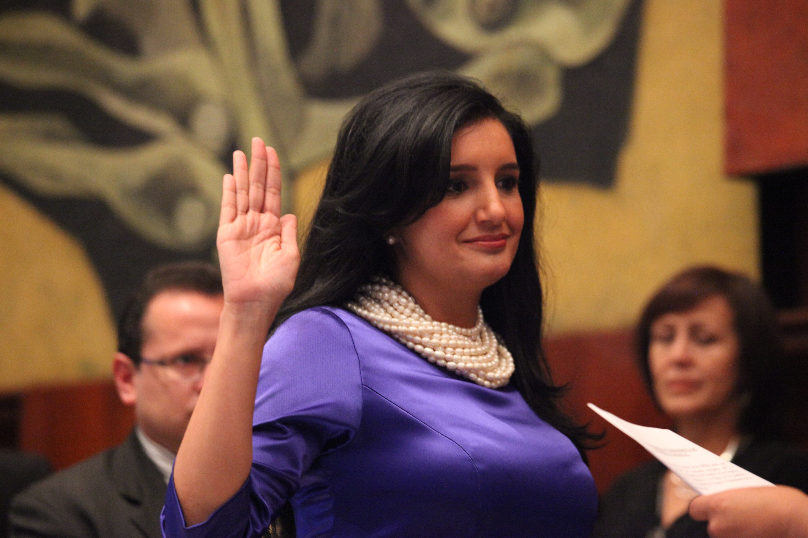 Foto: Hugo Ortiz Ron / Asamblea Nacional